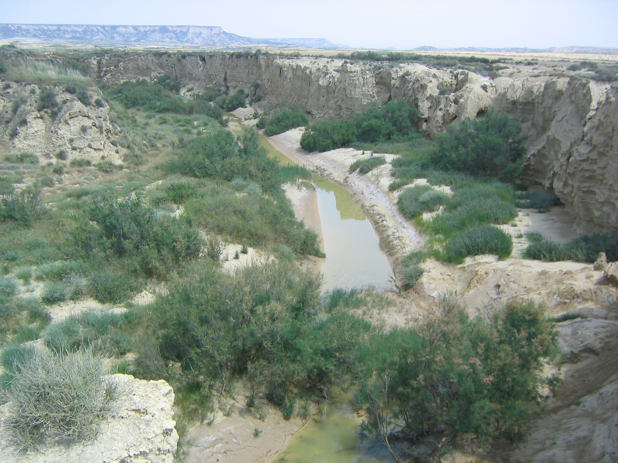 Paisaje de las Bardenas Reales de Navarra, Barranco Grande.